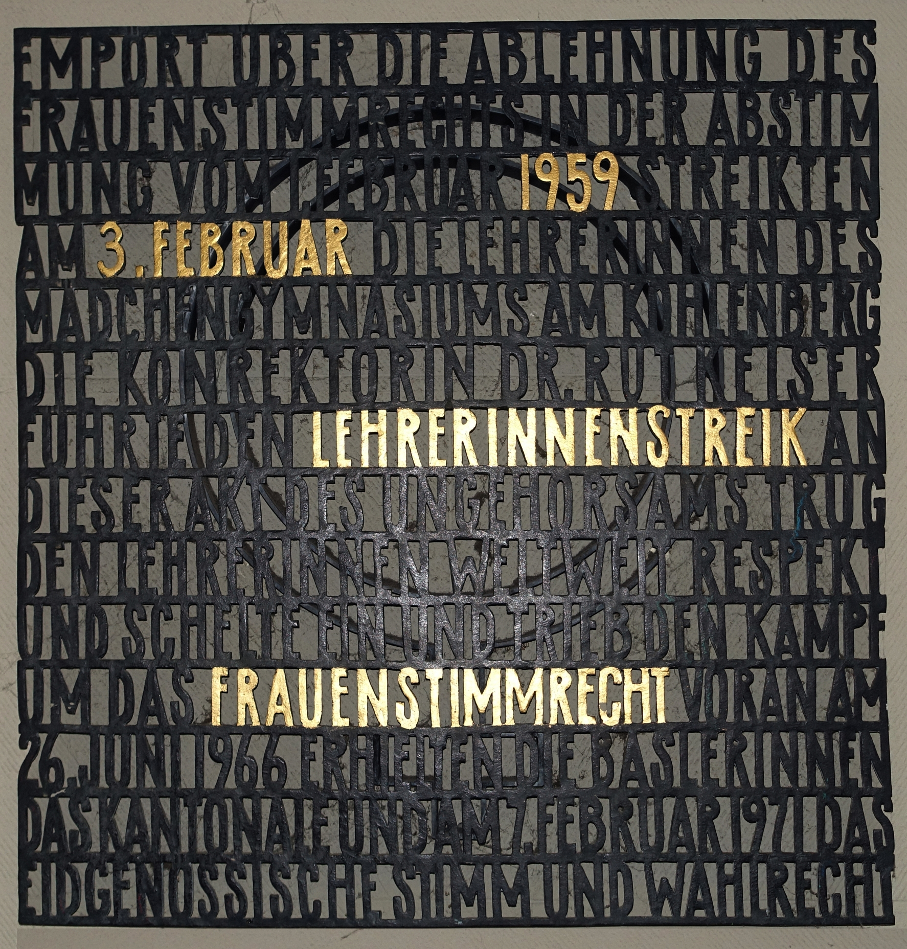 Erinnerung an den von Rut Keiser angeführten Lehrerinnenstreik am Mädchengymnasium am Kohlenberg in Basel 1959